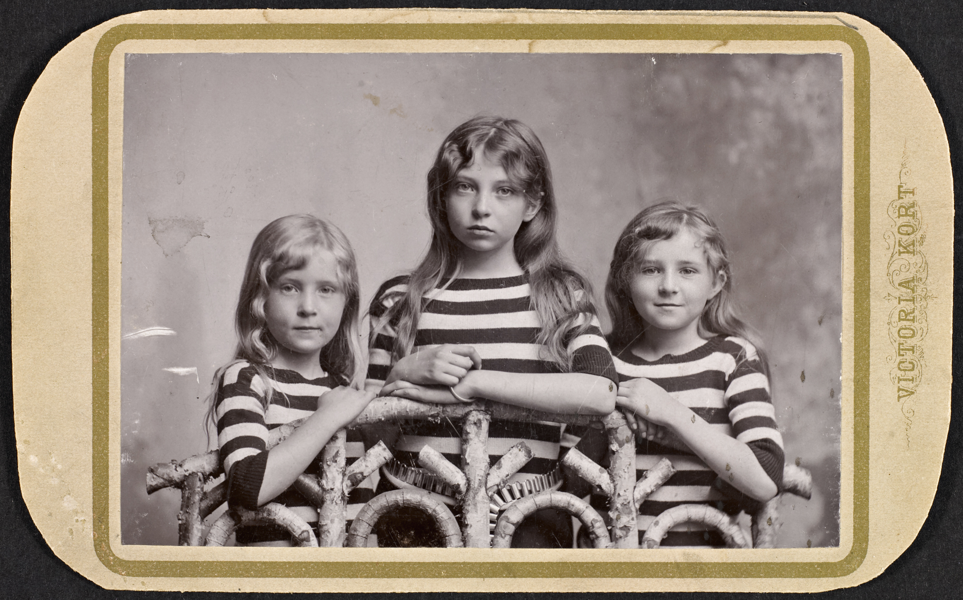 Tittel / Title: Sigrid Undset sammen med søstrene Signe og Ragnhild, 1894 Dato / Date: 1894 Fotograf / Photographer: ukjent / unknown Eier / Owner Institution: Nasjonalbiblioteket / National Library of Norway Lenke / Link: Bildesignatur / Image Number: blds_01061